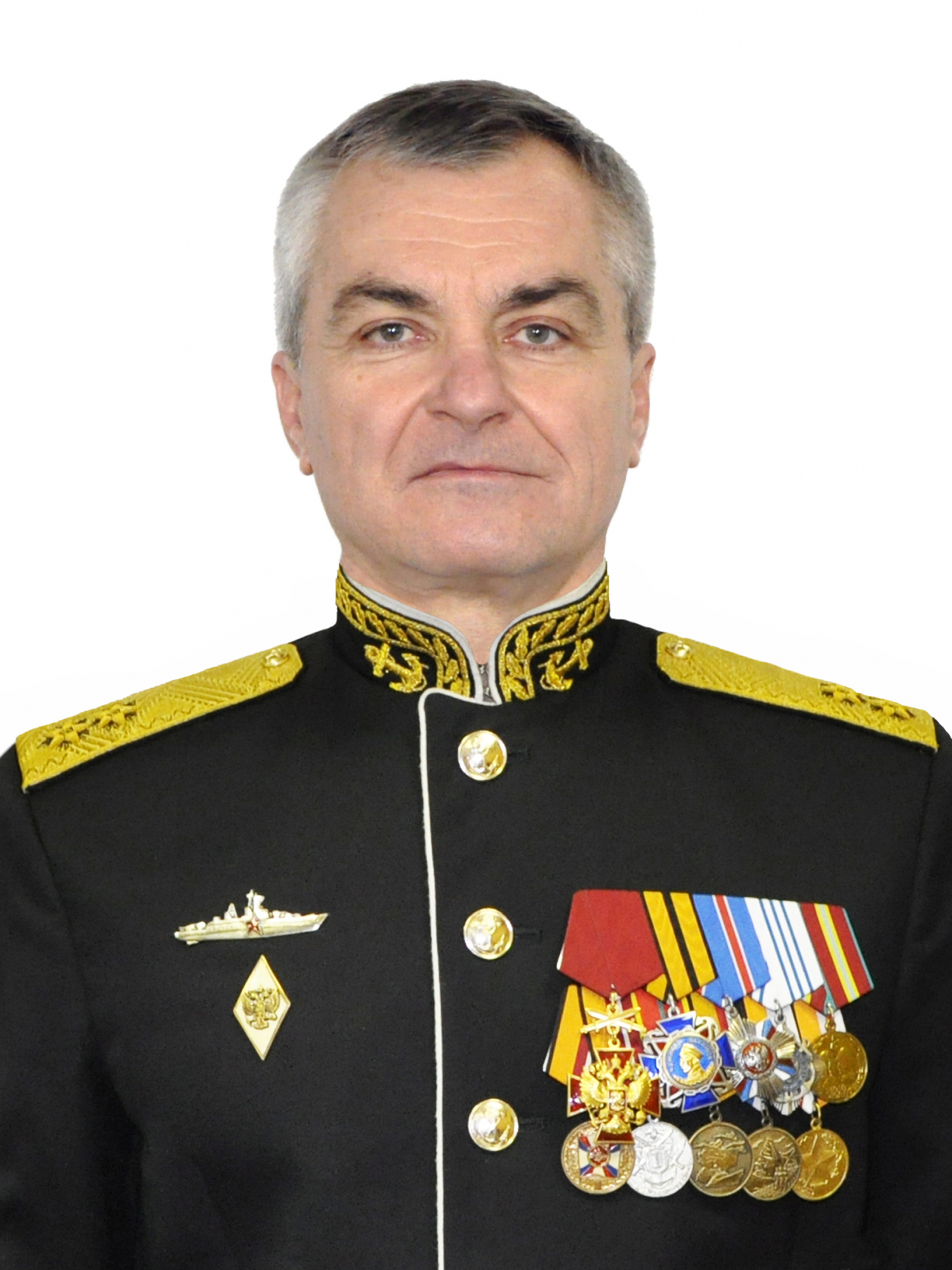 Начальник ВУНЦ ВМФ «Военно-морская академия имени Адмирала Флота Советского Союза Н.Г. Кузнецова» вице-адмирал Соколов Виктор Николаевич